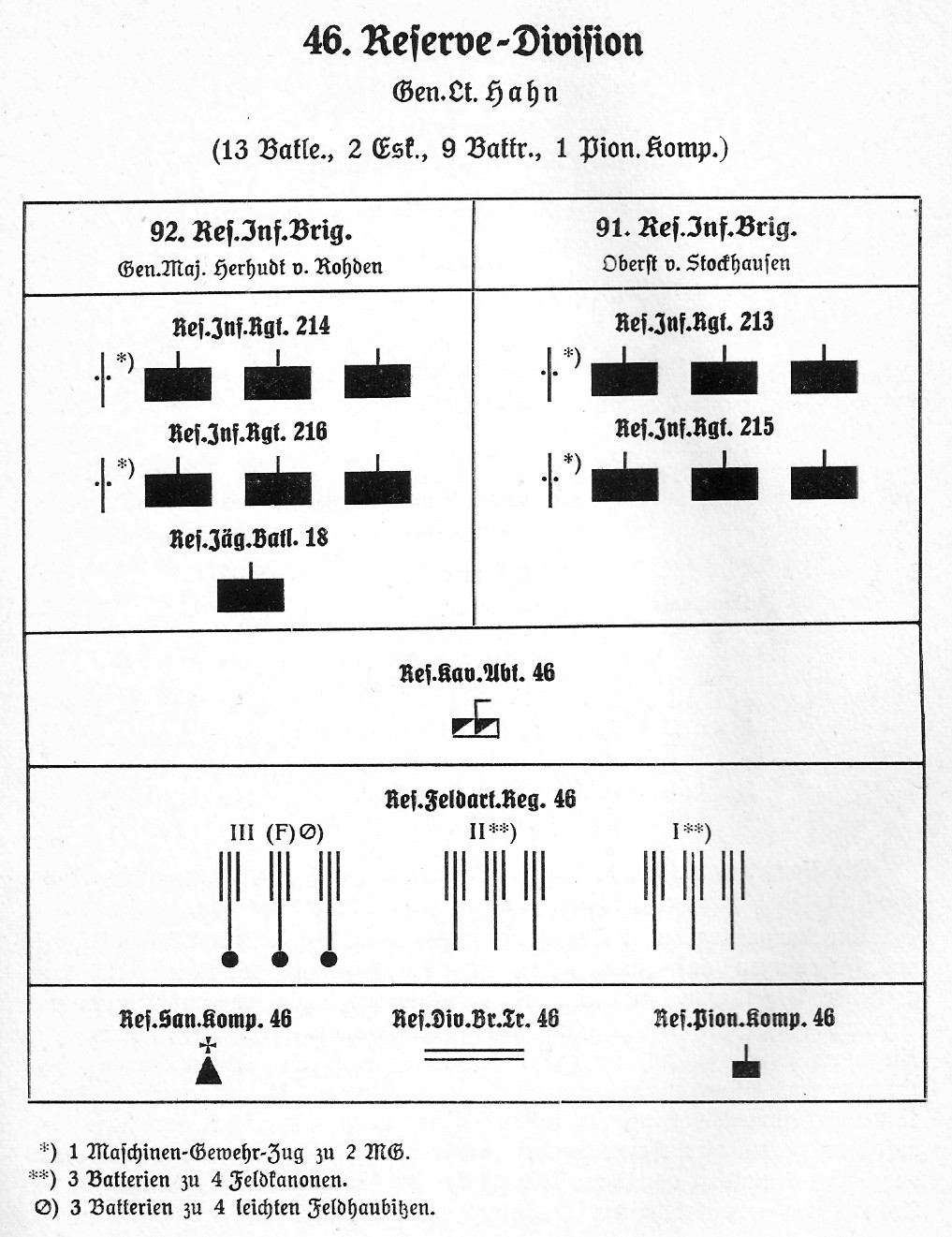 46. Reserve-Division, Kriegsgleiderung (1914)